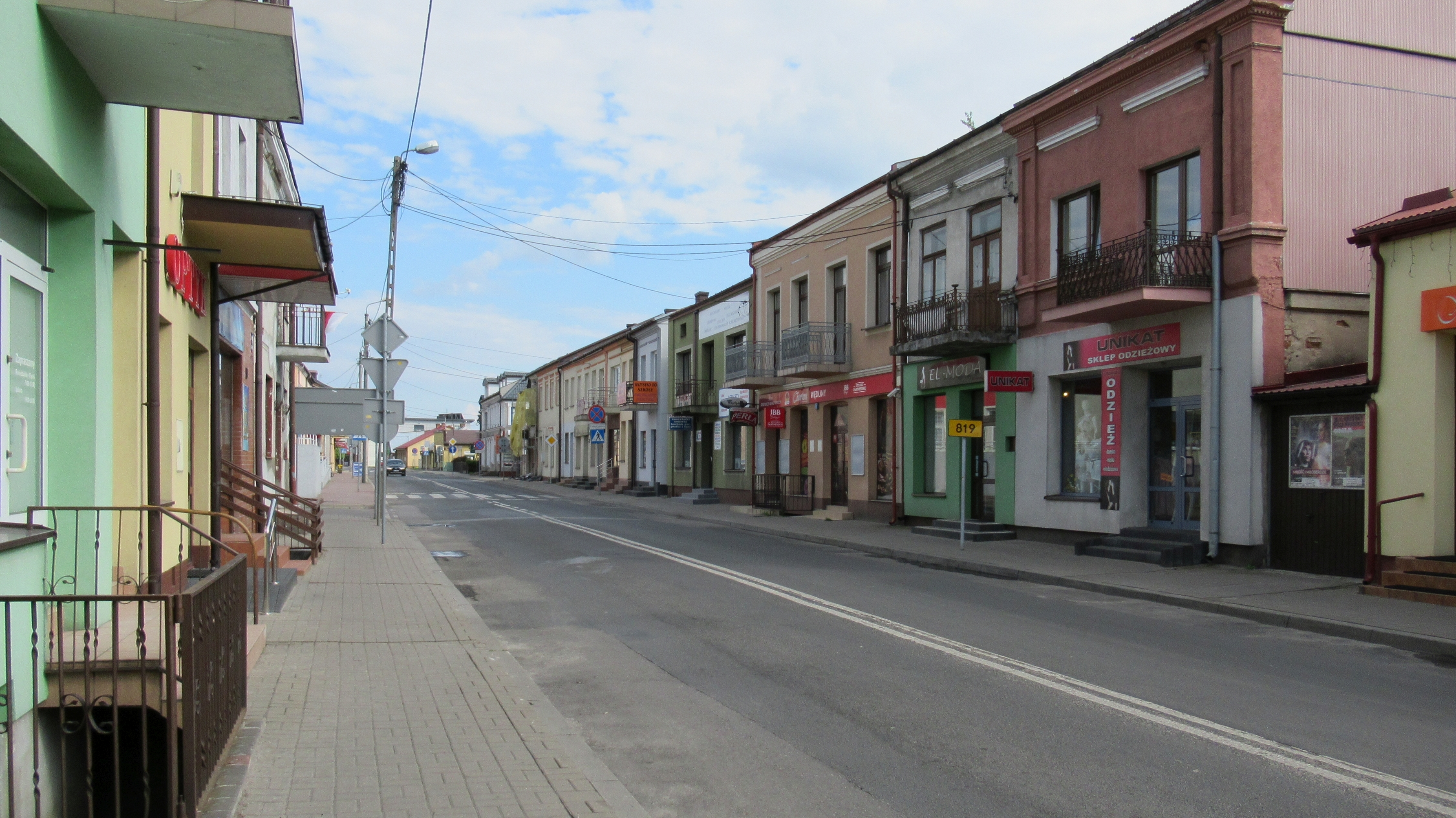 Parczew (woj. lubelskie, Polska). Ulica Kościelna w ciągu drogi wojewódzkiej nr 819.